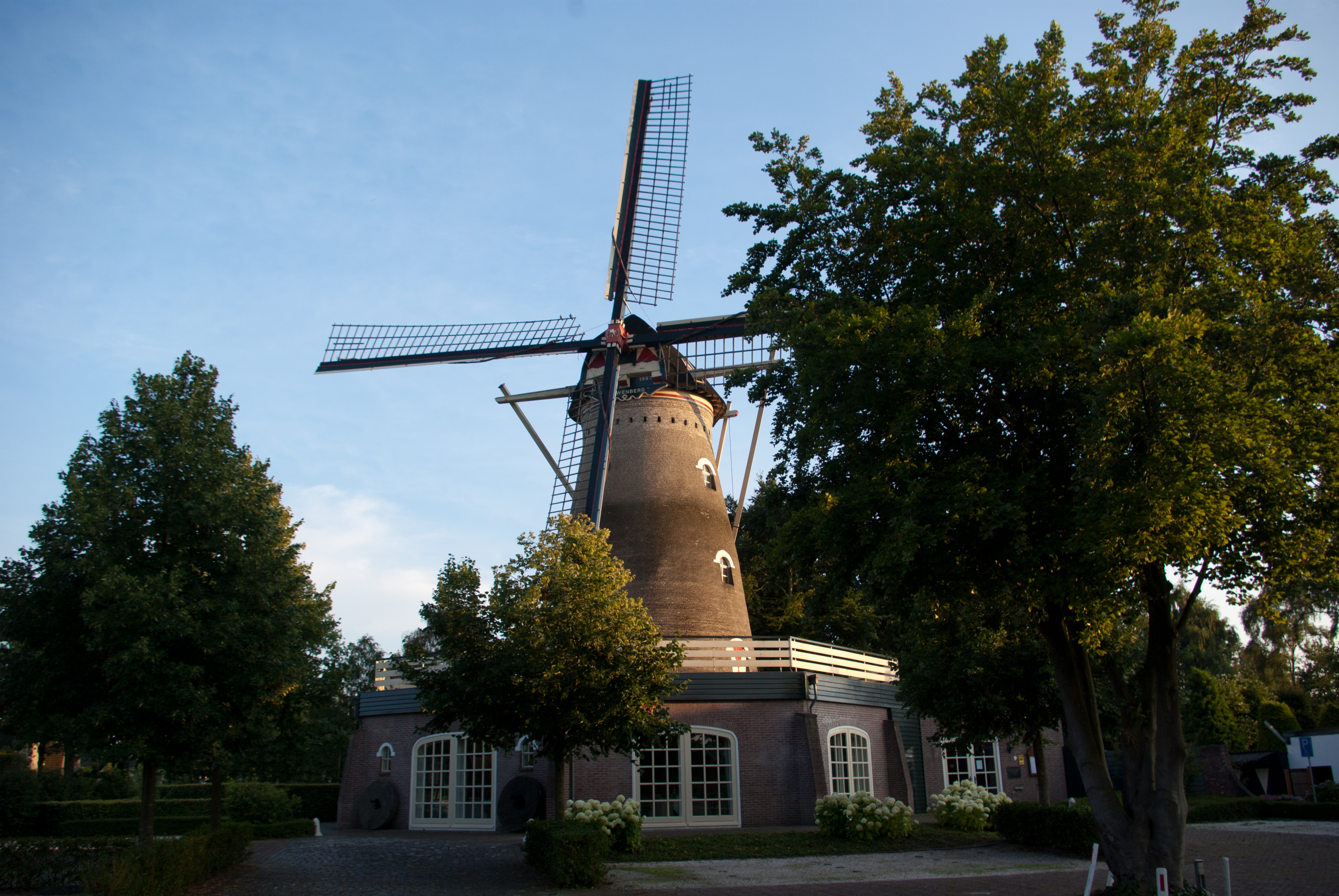 Korenmolen De Couwenbergh is inmiddels een horecalocatie.